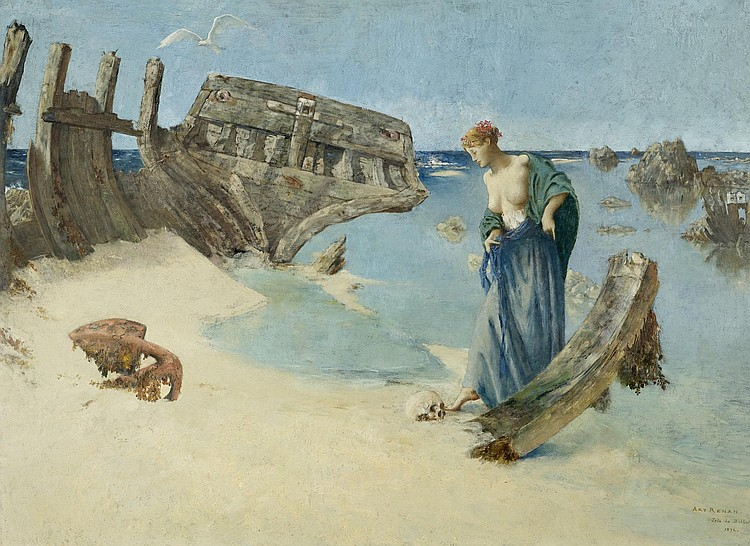 Jeune fille contemplant un crâne près d'un bateau naufragé au bord de la mer.